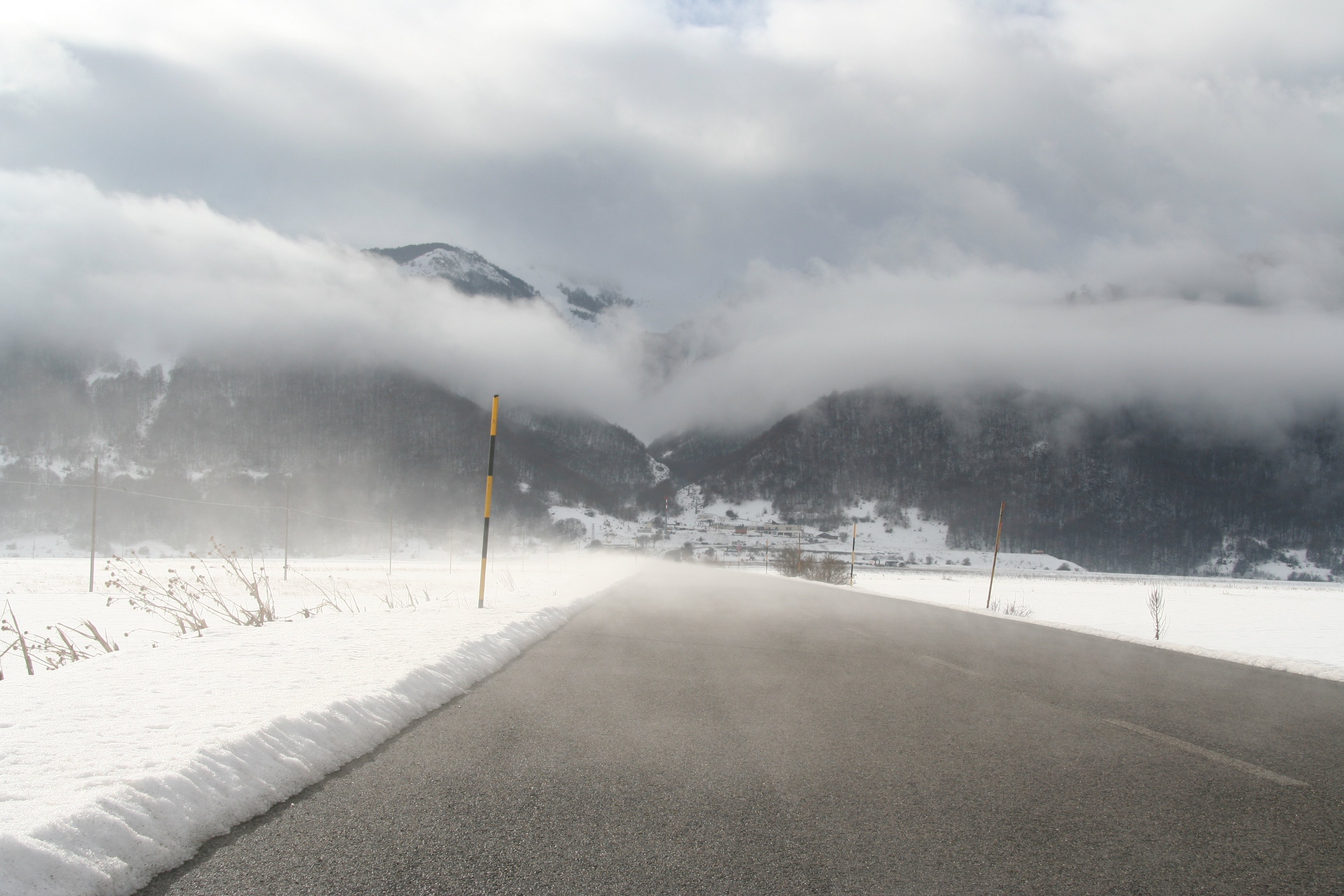 roccaraso tra neve e nuvole (DC)